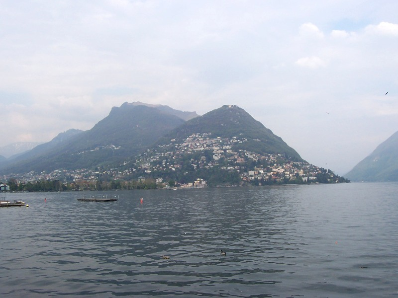 Lugano - Veduta del Monte Brè